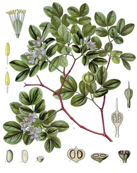 Guajak-Baum. A blühender Zweig, nat. Grösse; 1 Blüthe ohne Krone, vergrössert; 2 Staubgefäss, desgl.; 3 Stempel, desgl.; 4 derselbe im Querschnitt, desgl.; 5 derselbe im Längsschnitt, desgl.; 6 Frucht der Länge nach durchschnitten, nat. Grösse; 7 dieselbe im Querschnitt, desgl.; 8 der Same, vergrössert; 9 derselbe im Querschnitt, desgl.; 10 derselbe im Längsschnitt, desgl.